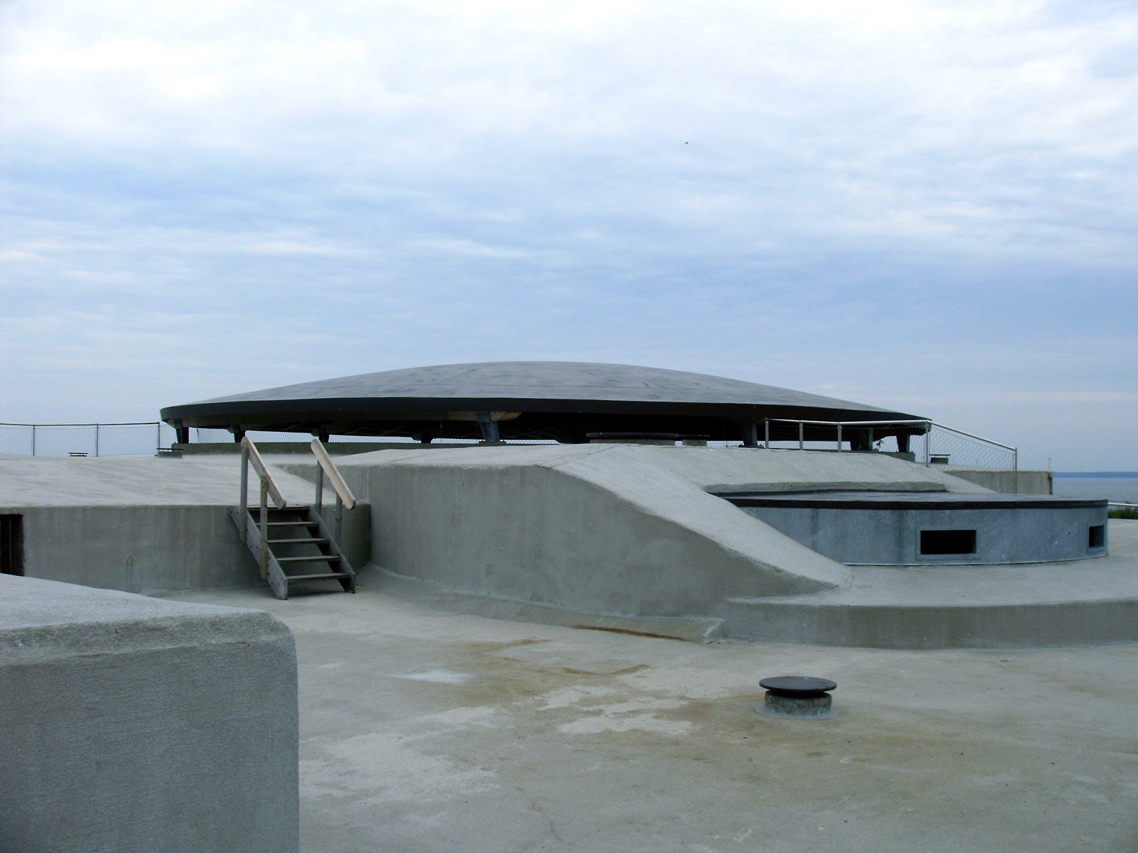 De oostelijke koepel op Fort Pampus op de lokatie waar vroeger de pantserkoepel stond met 2 kanonnen erin.